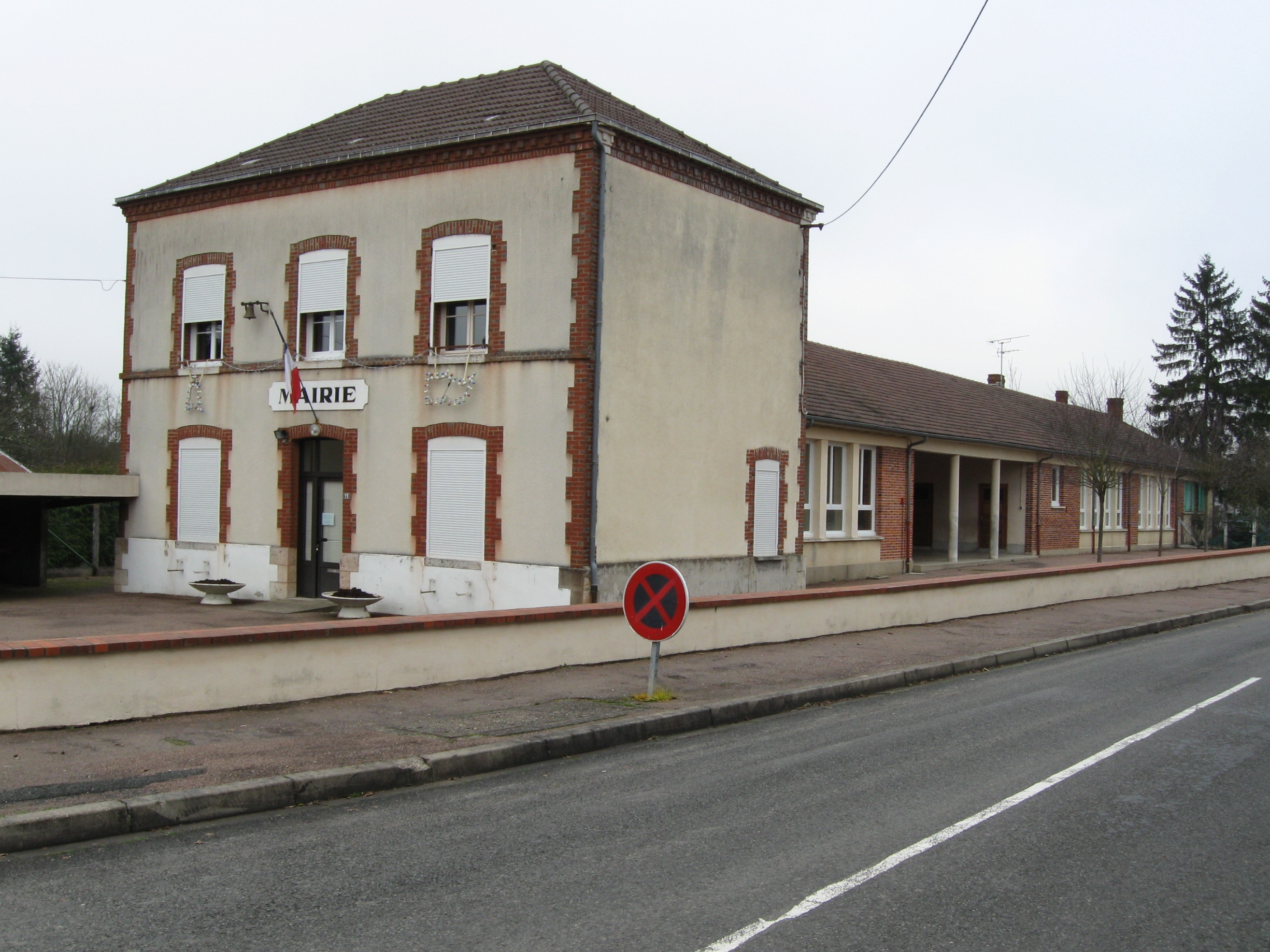 Dammarie-sur-Loing, la mairie.